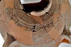 כתובת אשבעל בן בדע התגלתה ב-2012 בחורבת קייאפה. הכתובת היא בכתב כנעני עתיק